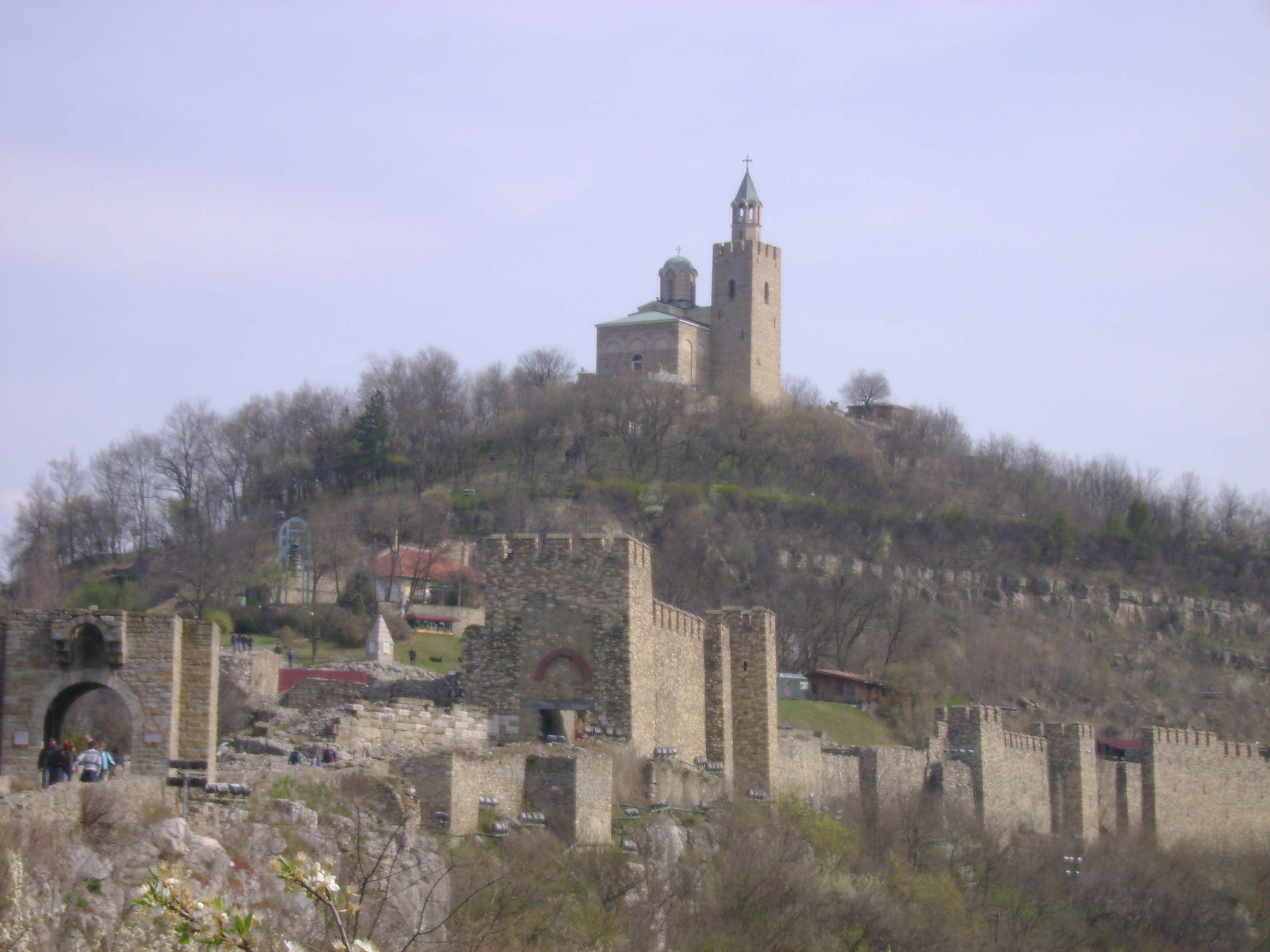 Veliko Tarnovo, Bulgaria